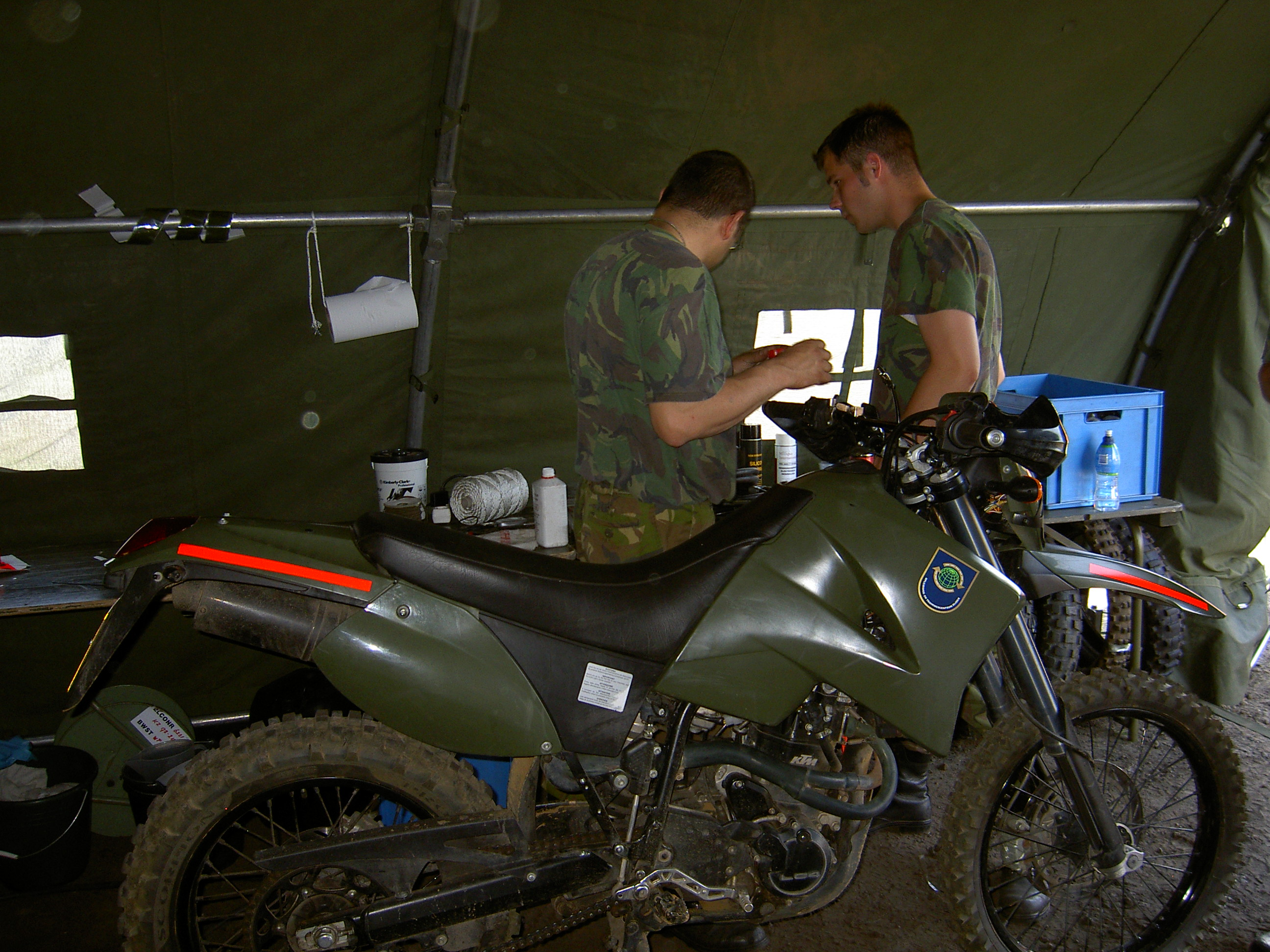 KTM 400 LS-E Military bei Wartungsarbeiten.